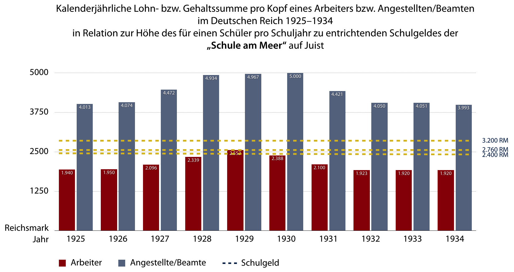 Für jeden Schüler der reformpädagogischen Schule am Meer (1925–1934) von Martin Luserke auf der Nordseeinsel Juist war seitens der Eltern pro Schuljahr ein Schulgeld zu entrichten. Das Balkendiagramm zeigt dessen Relation zu der unterschiedlichen Höhe des kalenderjährlichen Durchschnittslohns bzw. -gehalts von Arbeitern, Angestellten und Beamten der damaligen Zeit. Es wird deutlich, dass die Schüler aus gut situierten bzw. wohlhabenden Familien stammen mussten, um sich den Schulbesuch dort leisten zu können. Die dem Diagramm zugrunde liegenden statistischen Werte zu den Einkommensverhältnissen 1925–1934 basieren auf dem GESIS – Leibniz-Institut für Sozialwissenschaften e. V.[1], die Schulgeldhöhe aus einer Zeitung.[2]